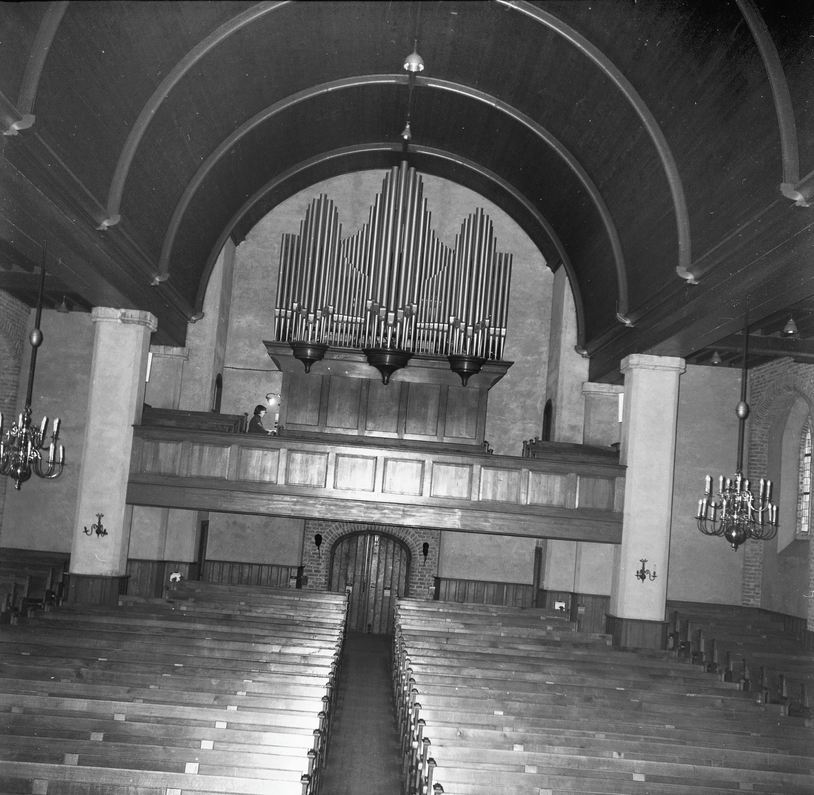 Nederlands Hervormde Kerk: interieur naar het orgel